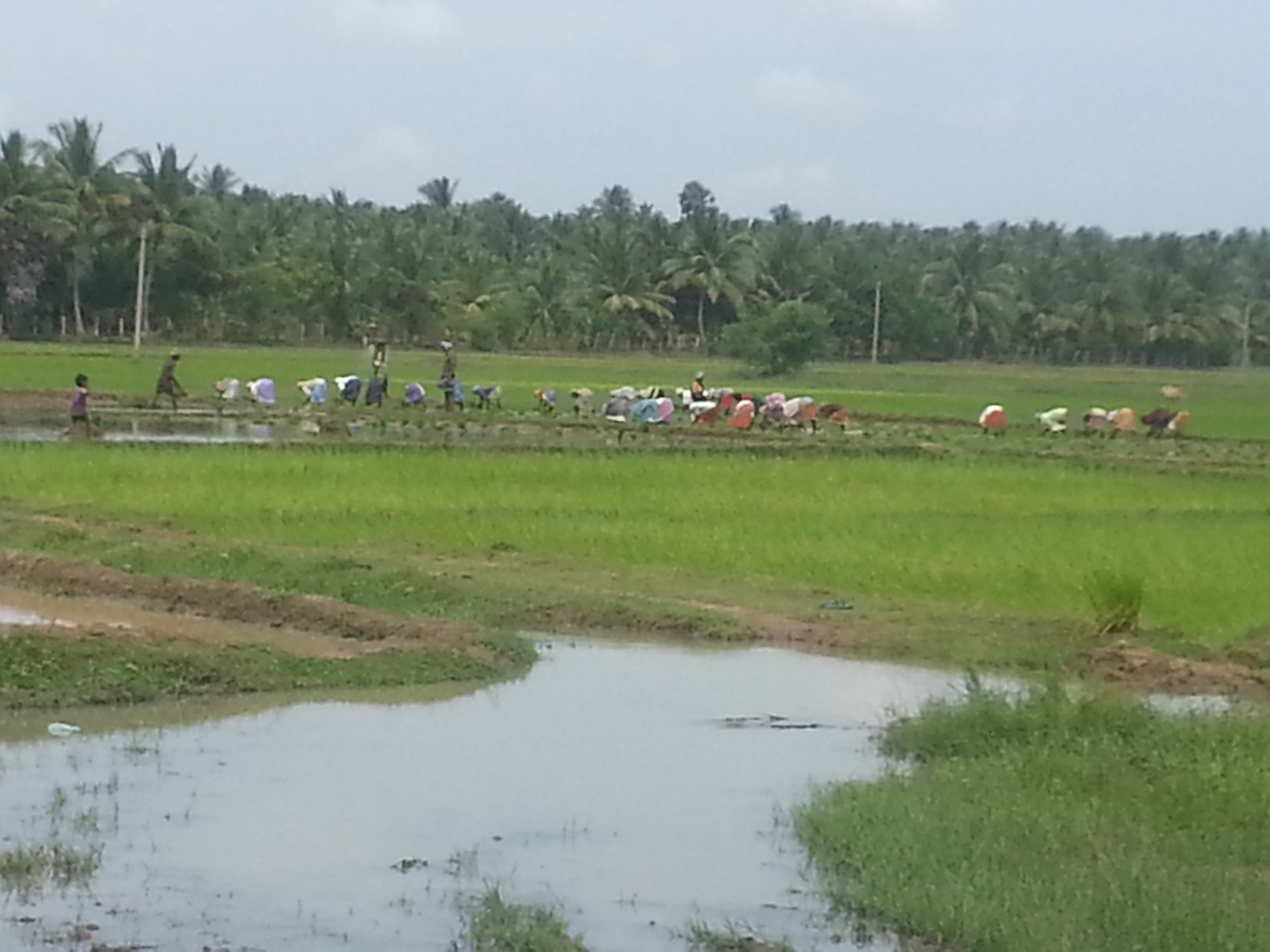 முடச்சிக்காடு வேளாண்மைப் பணி